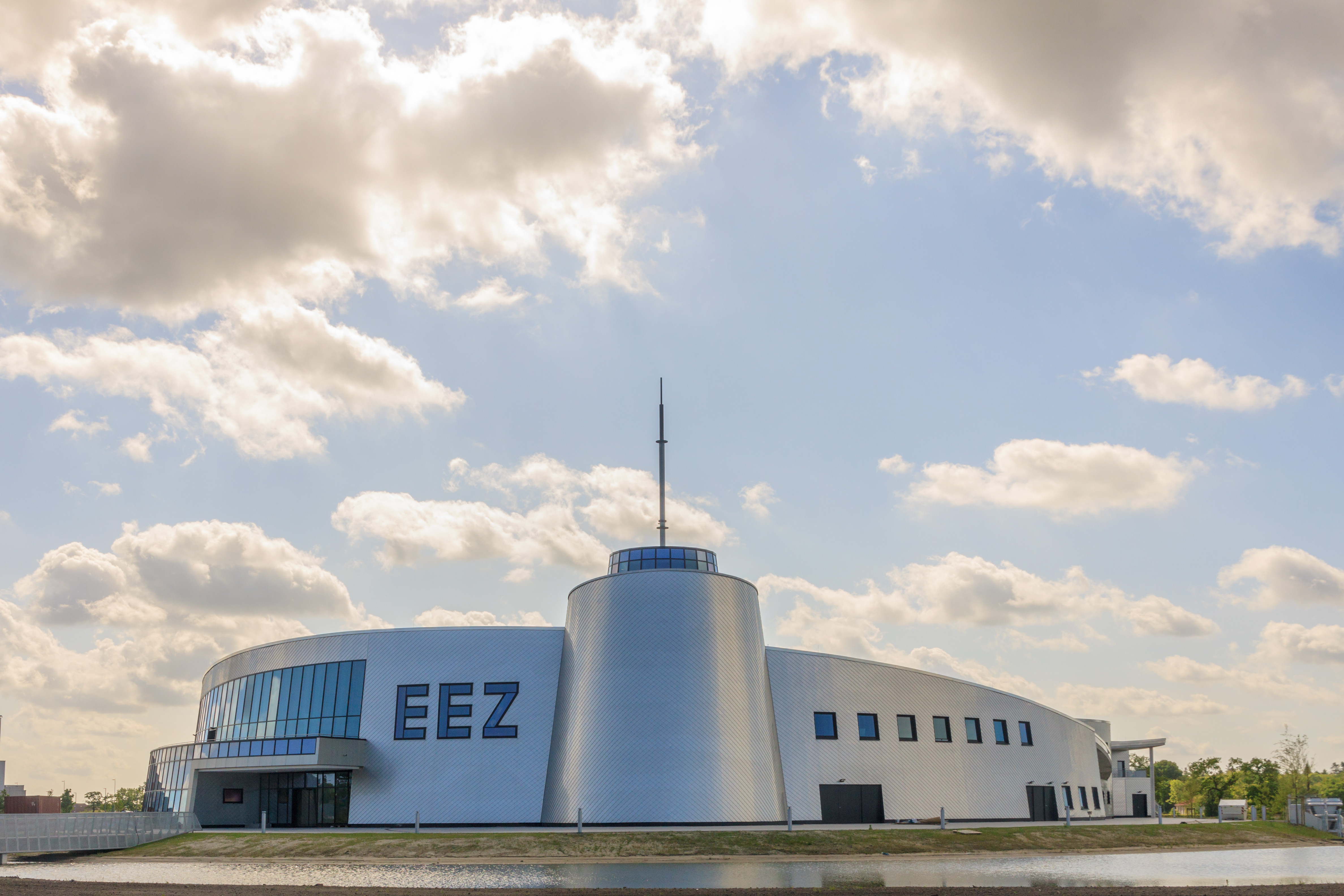 Das Energieerlebniszentrum (EEZ) in Aurich